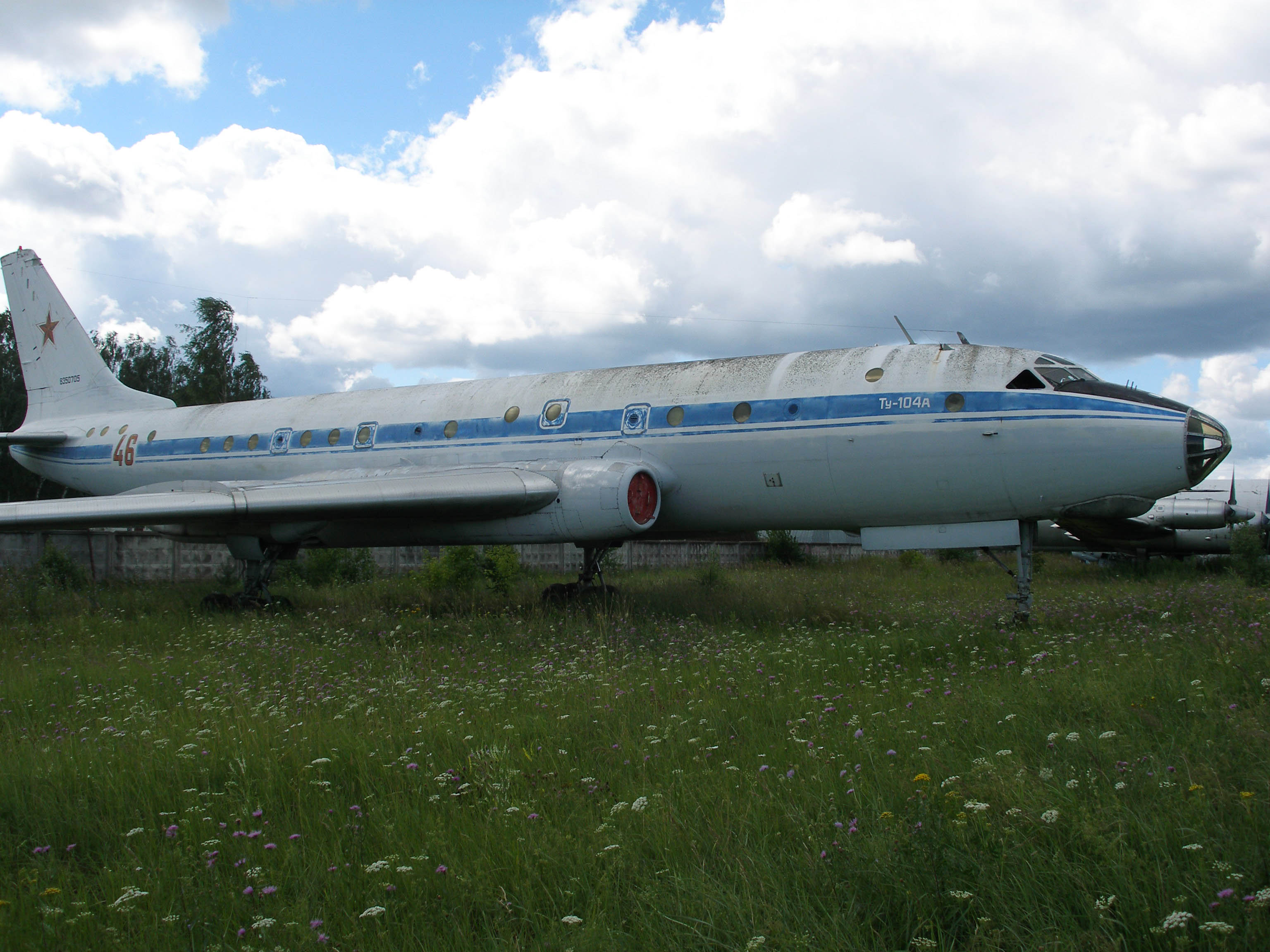 Тy-104 летающая лаборатория для подготовки космонавтов в Монино (Tu-104 flying laboratory for preparing astronauts in Monino museum)